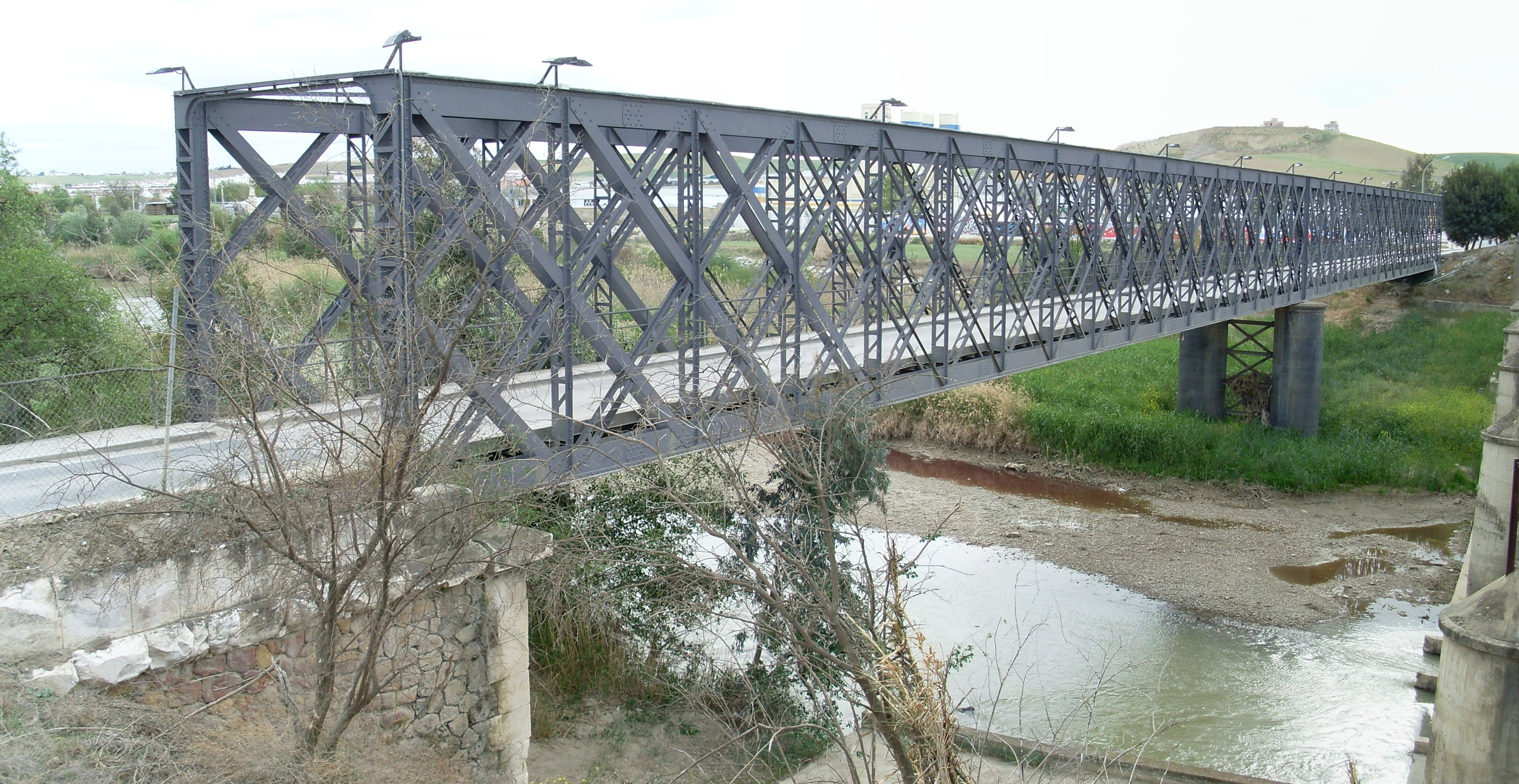 Antigüo puente ferroviario de Écija, para evitar el cauce del río Genil a su paso por la ciudad.